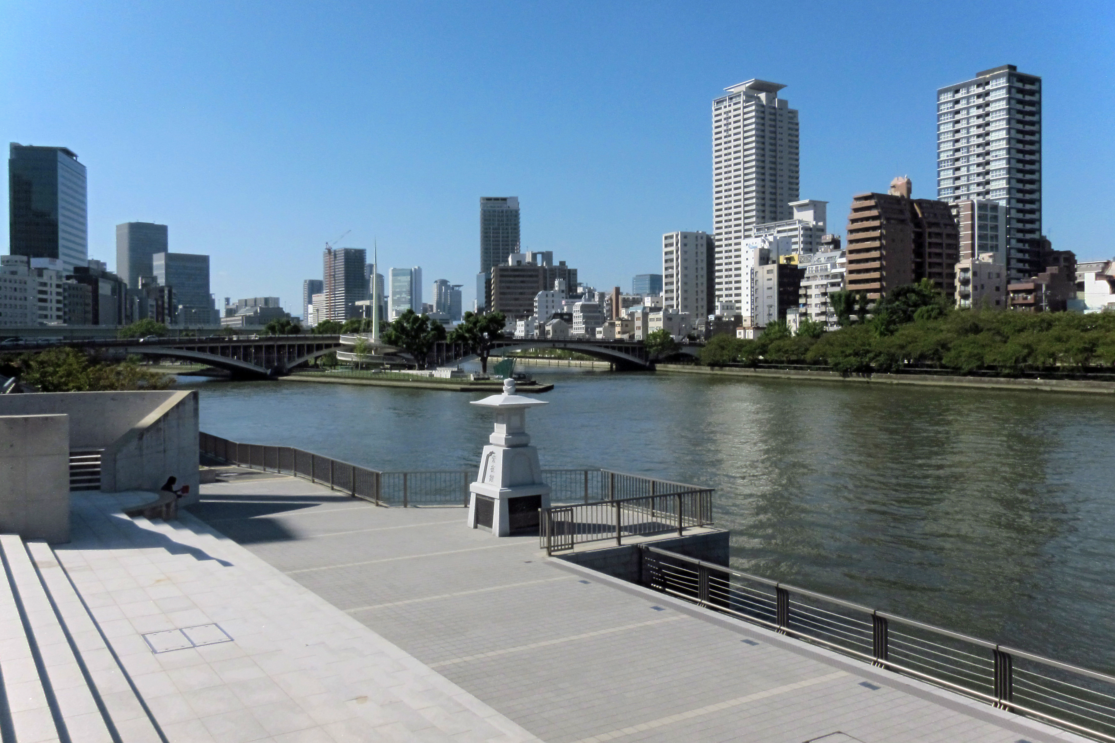 Hachikenya (八軒家船着場、川の駅はちけんや), Osaka, Osaka prefecture, Japan